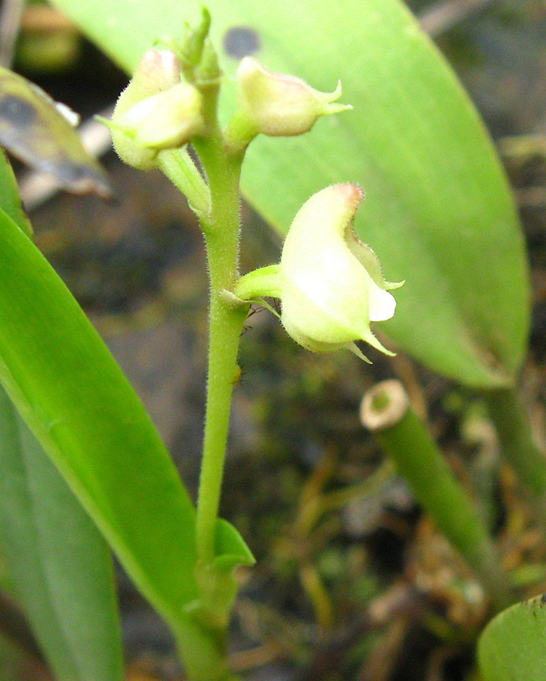 Inflorescence lâche.